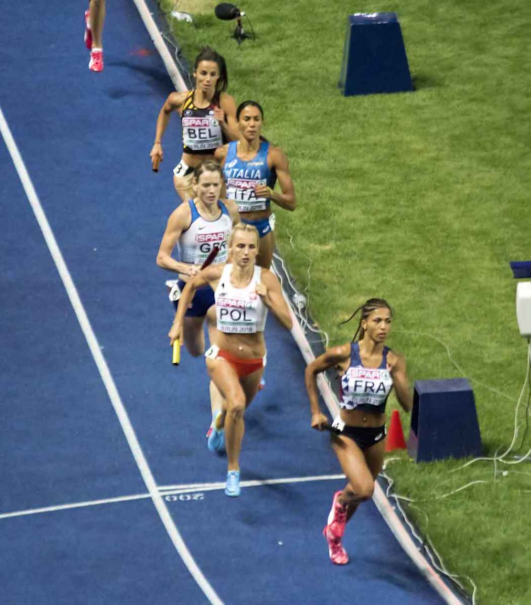 EKB42741 4x400m dames laus